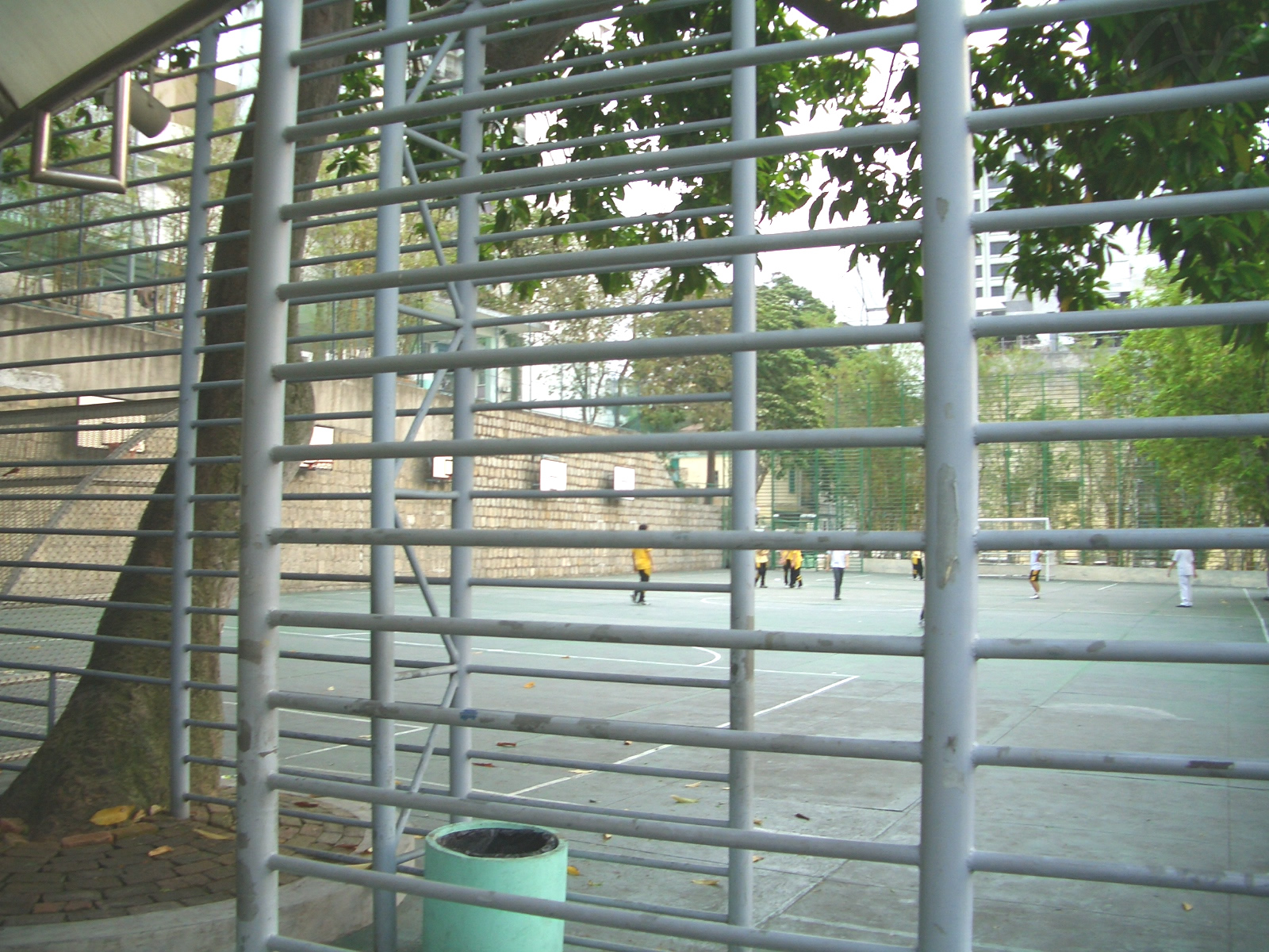 粵華中學校園內大足球場擴建前的面貌。